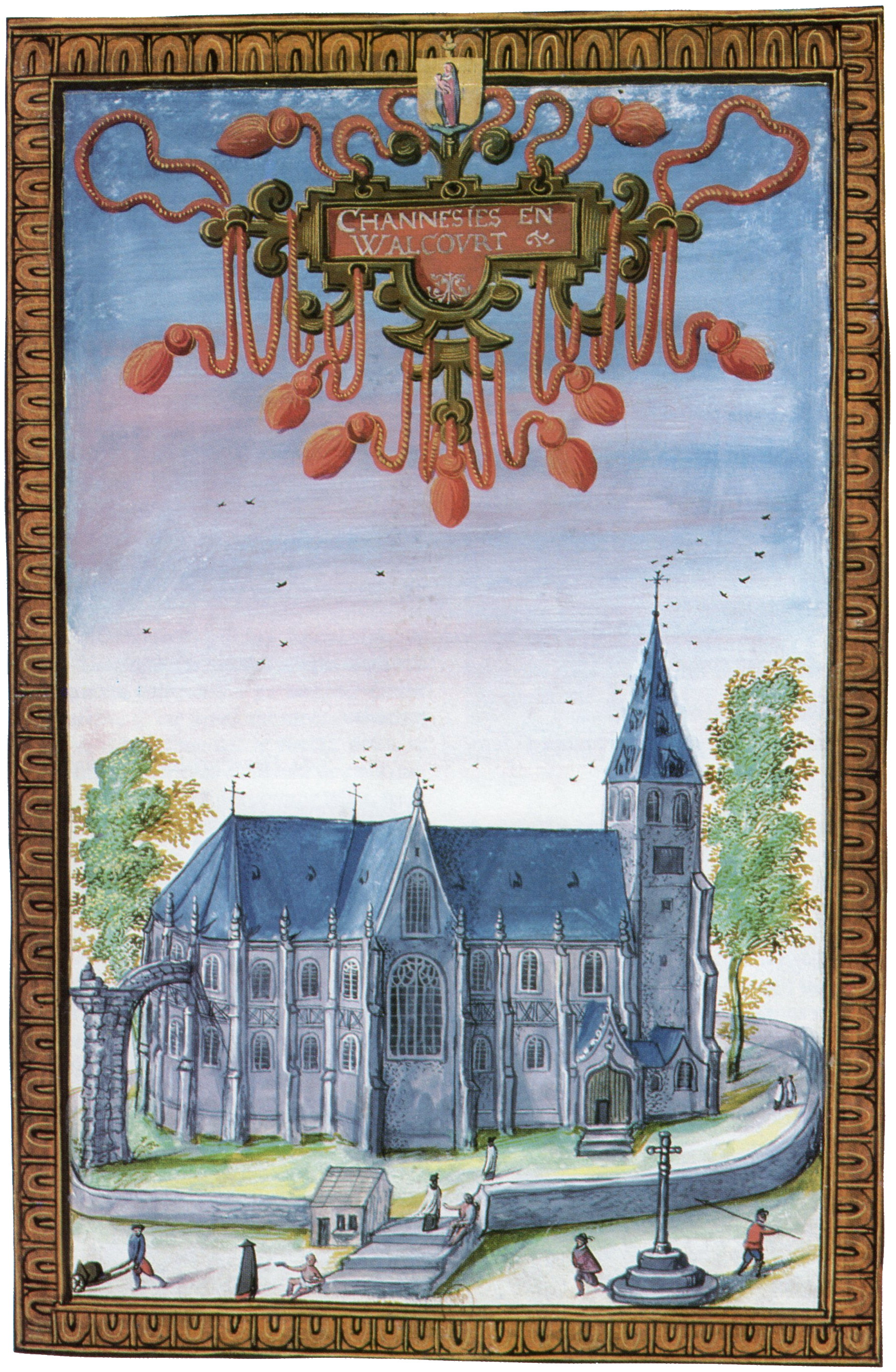 Collégiale Notre-Dame à Walcourt en 1604. Albums de Croÿ, Paris, Bibliothèque nationale.